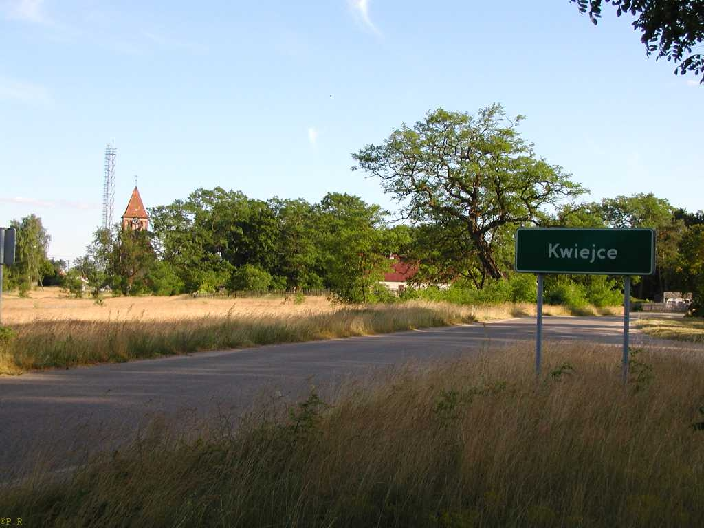 Wjazd do Kwiejc od strony Kamiennika i Chelstu.